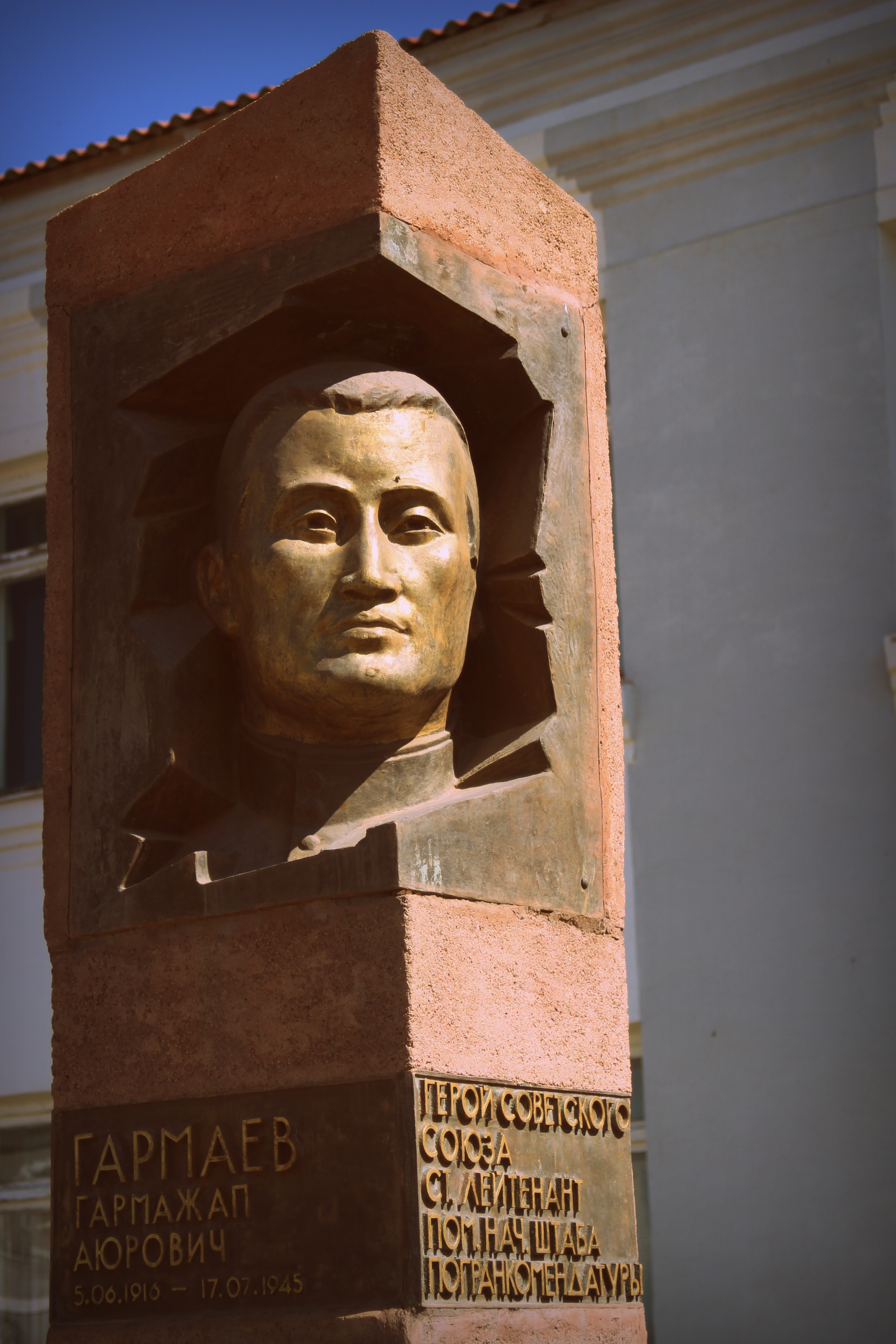 Памятник Гармажапу Гармаеву в Петропавловке. Джидинский район Бурятии